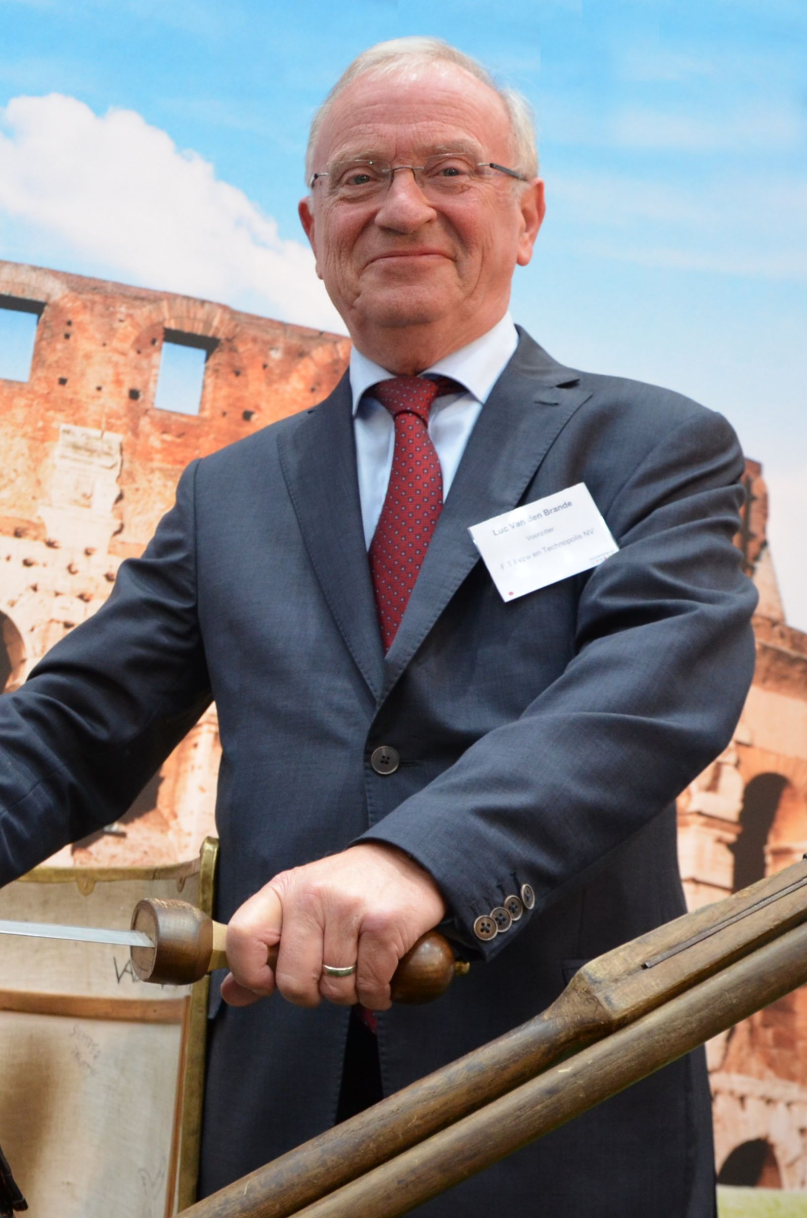 Vlaams politicus Luc Van den Brande als voorzitter van Technopolis Mechelen tijdens de opening van de thematentoonstellingHigh Tech Romeinen'.